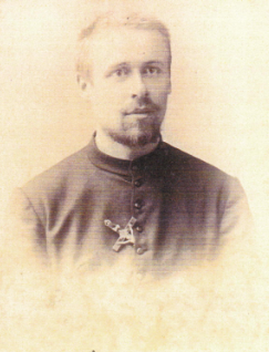 Le père Savina vient de se voir attribuer sa destination de mission